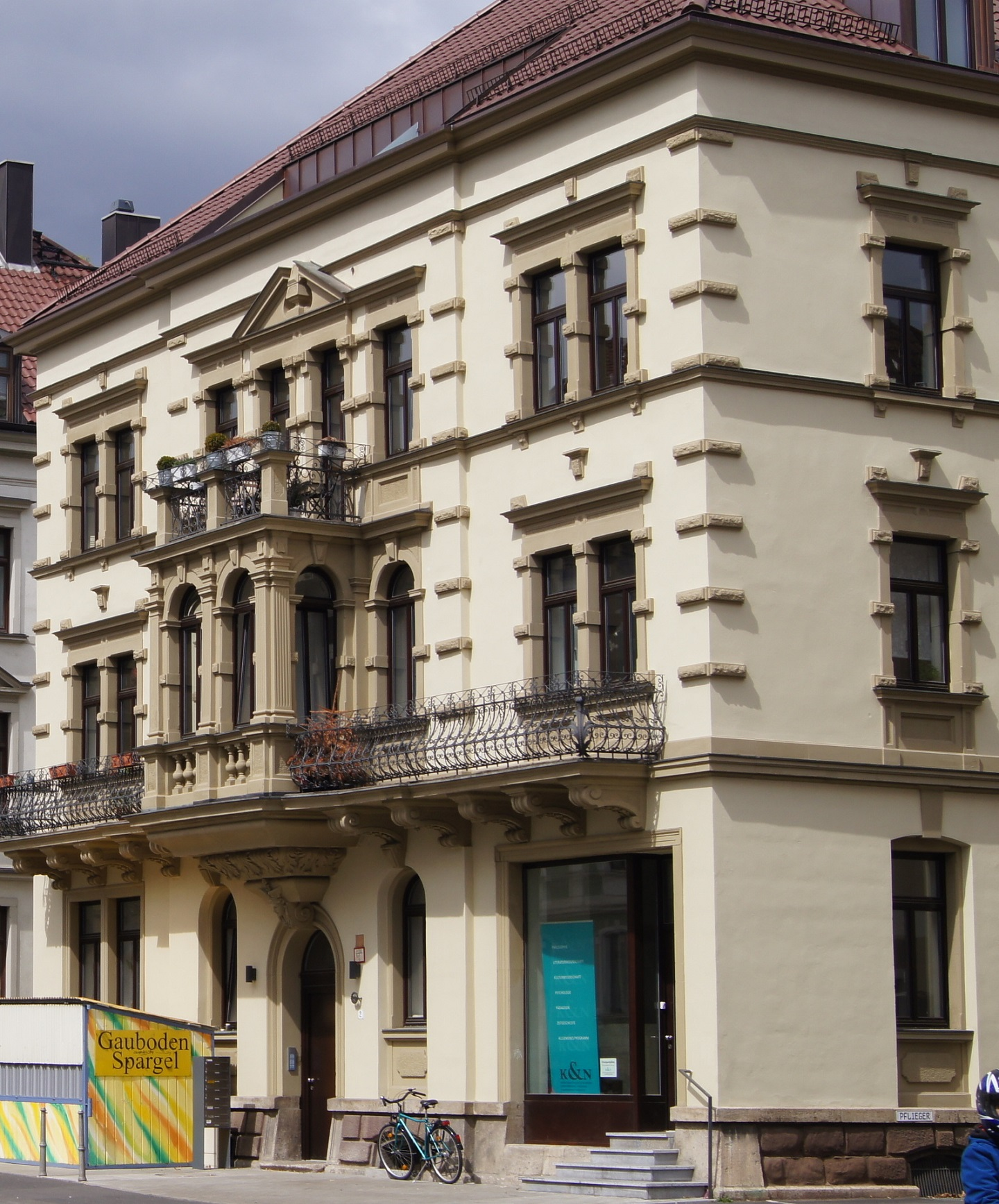 Denkmalgeschütztes Mietshaus, Würzburg - Leistenstraße 2